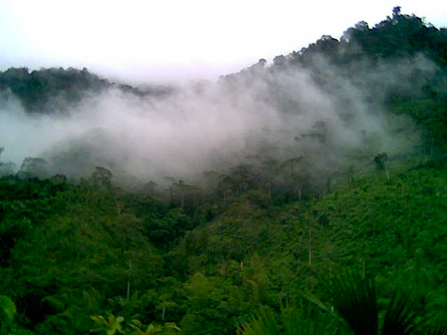 B_Secundario